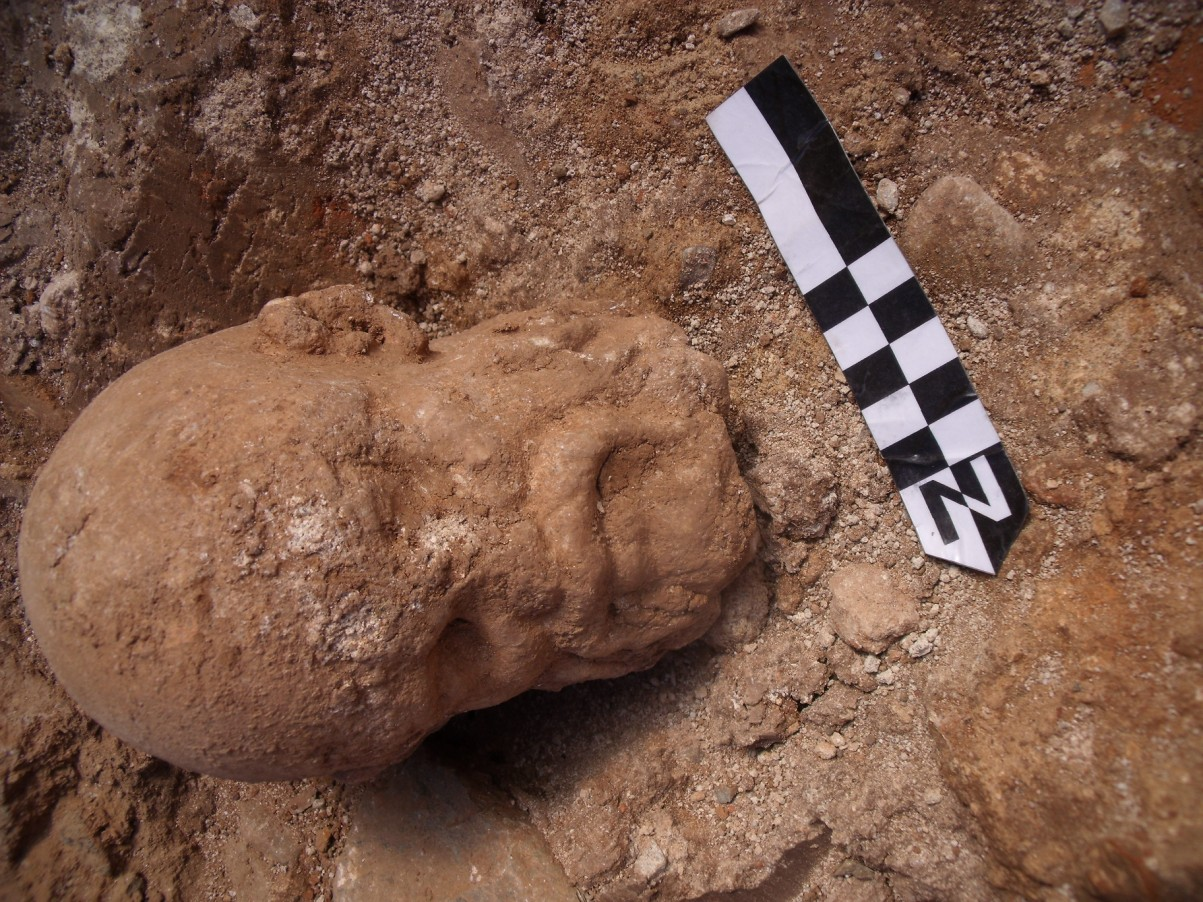 Cap escultòric d'un Silè recuperat als treballs de la vil·la romana del Pont del Treball Digne (Barcelona)